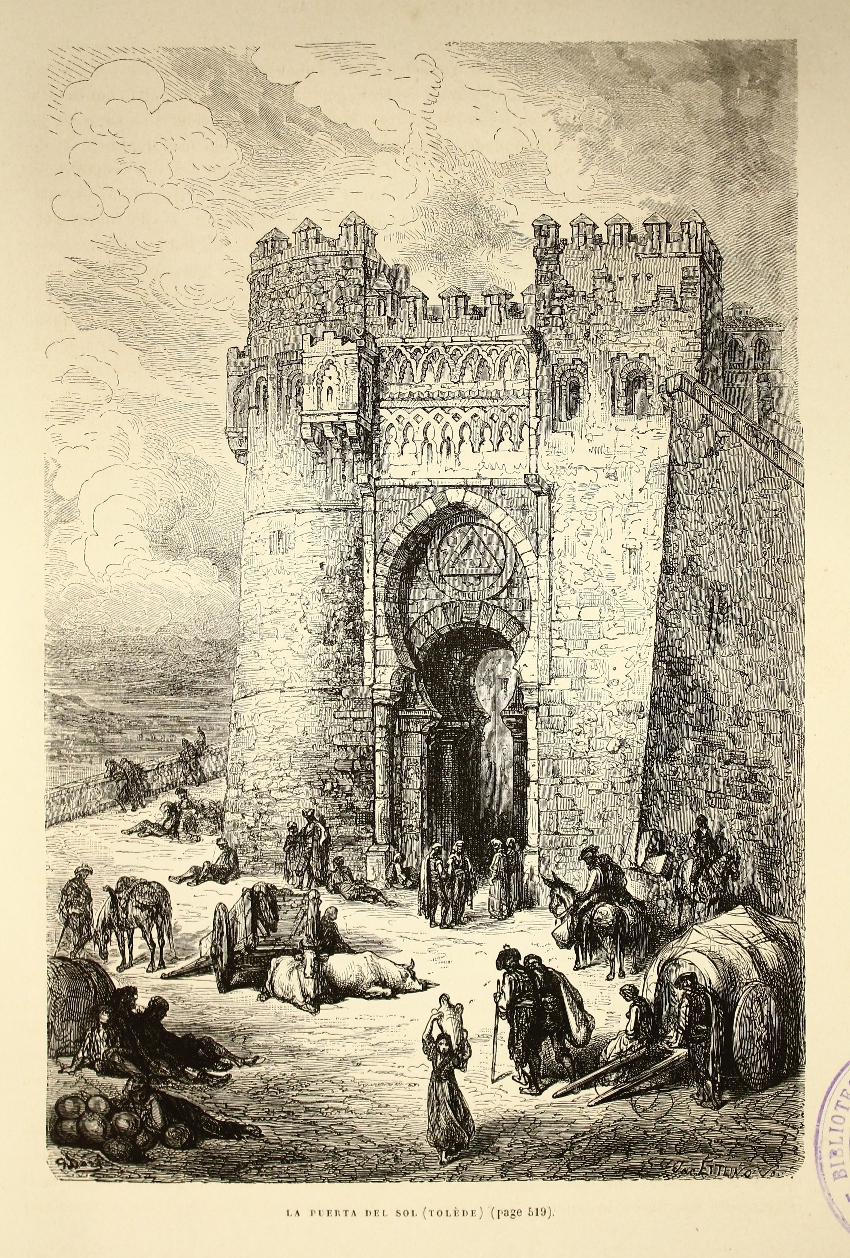 Autor: Davillier, Jean Charles, barón, 1823-1883 Descripción bibliográfica: L'Espagne / par Le Baron CH. Davillier ; ilustrée de 309 gravures dessinées su bois par Gustave Doré. - Paris : Librairie Hachette, 1874. - 799 p. : il. Materia: España- Geografía Materia: España- Usos y costumbres Ilustrador: Doré, Gustave, 1832-1883 Editor: Libreria Hachette Lugar de impresión: Francia, París Localización: Libro completo